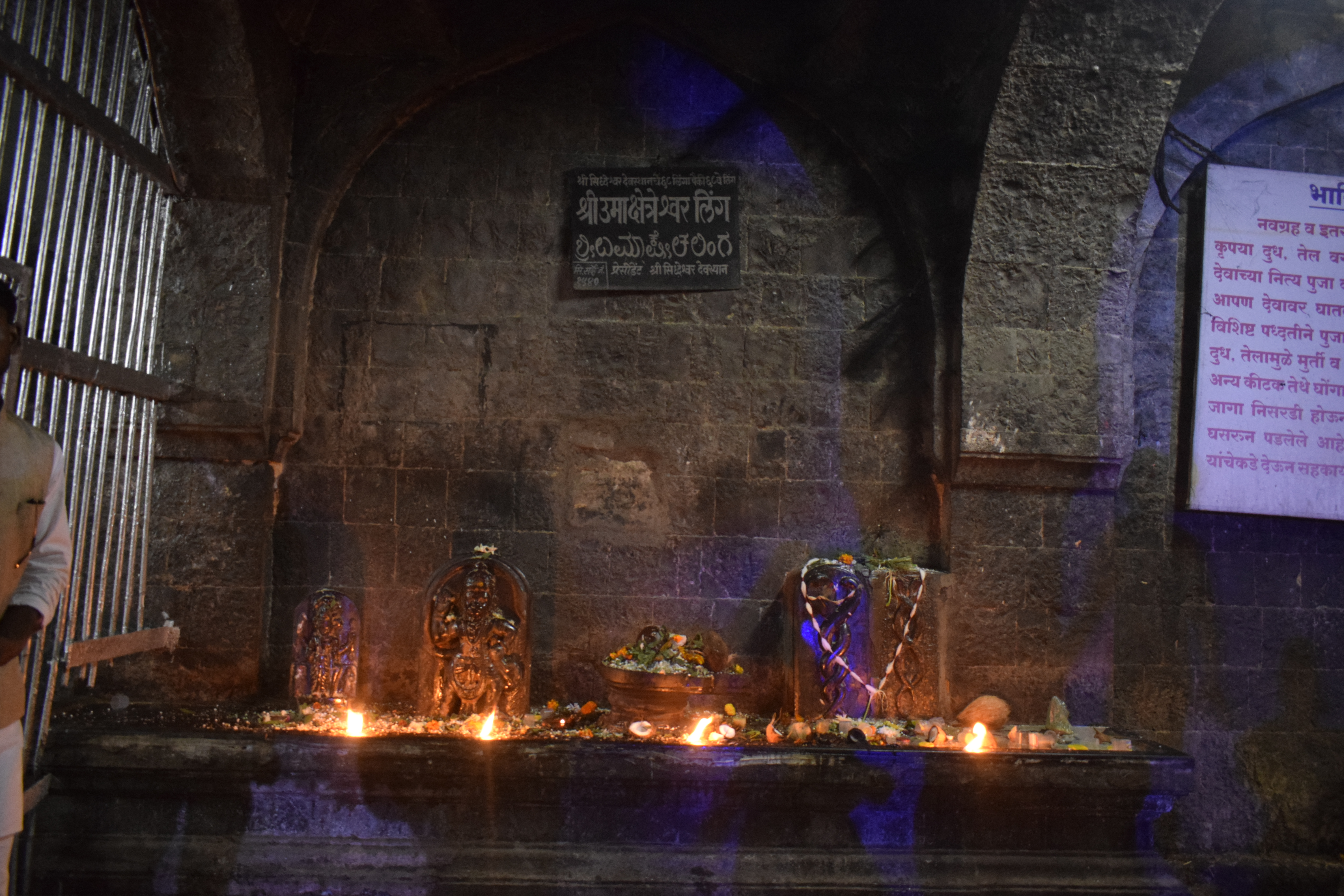 श्री उमाक्षेत्रेश्वर लिंग